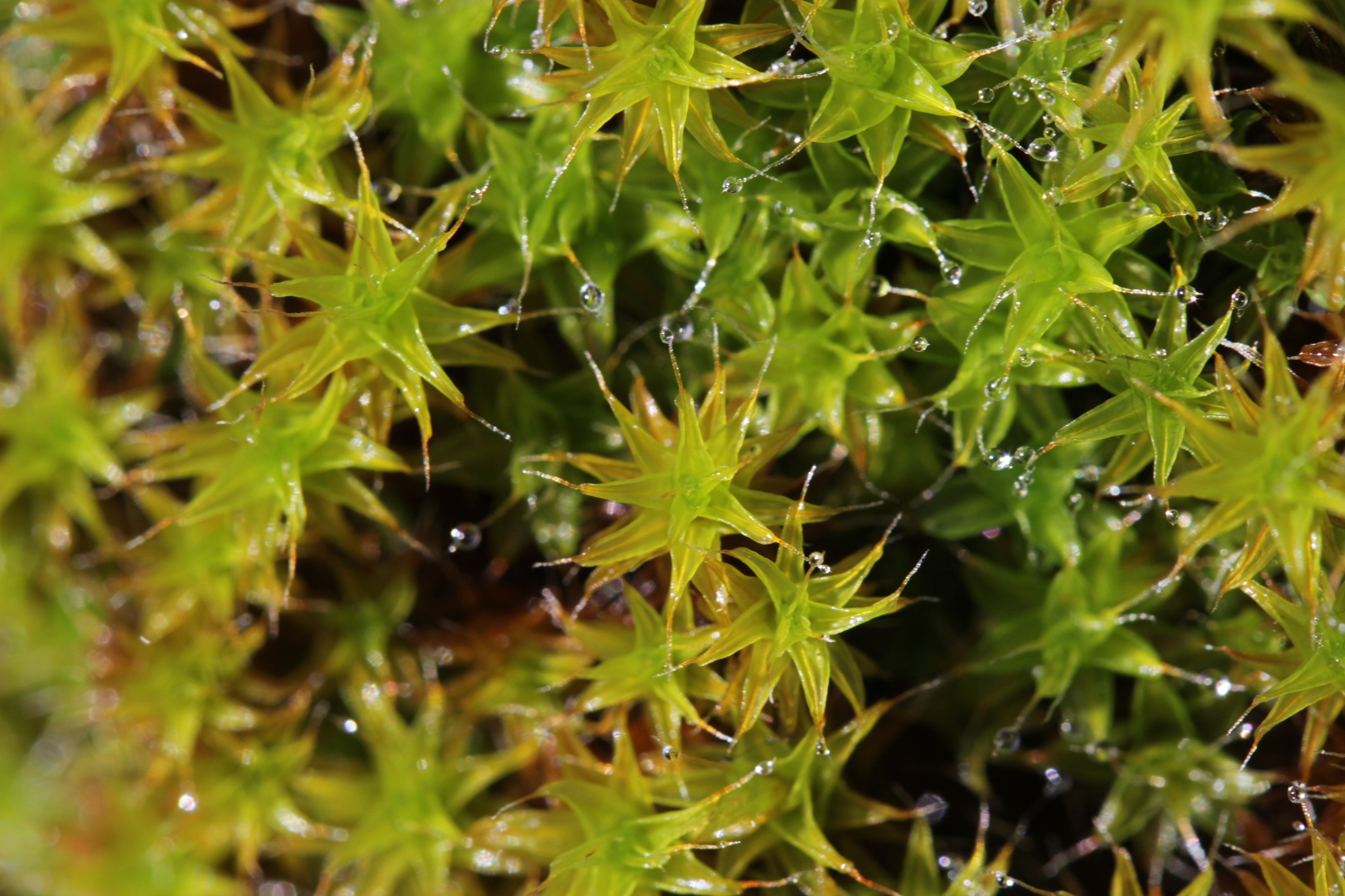 Moss - Tortula muralis